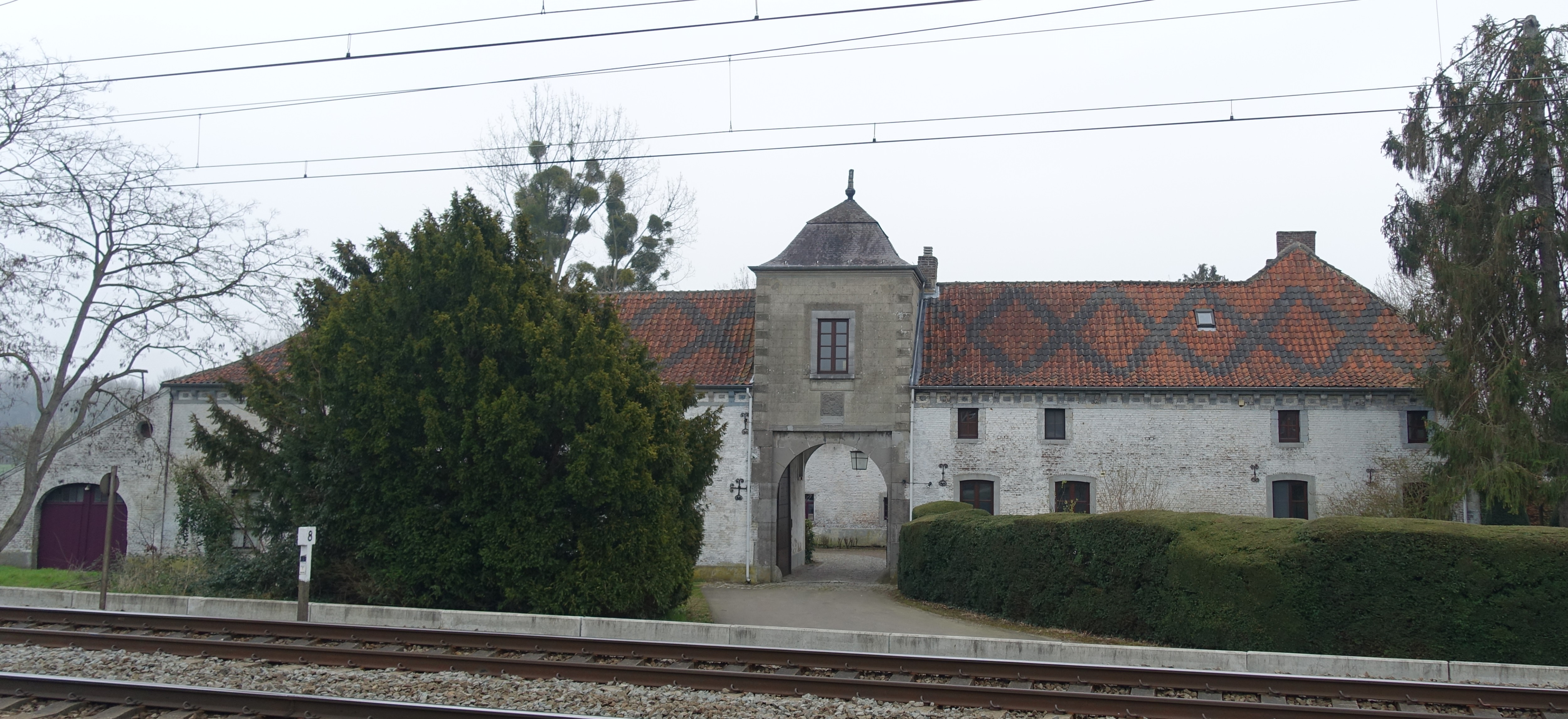 Herenhoeve als cijnshof reeds vermeld in 1324, waarvan de gebouwen dateren uit de 17de en 19de eeuw.